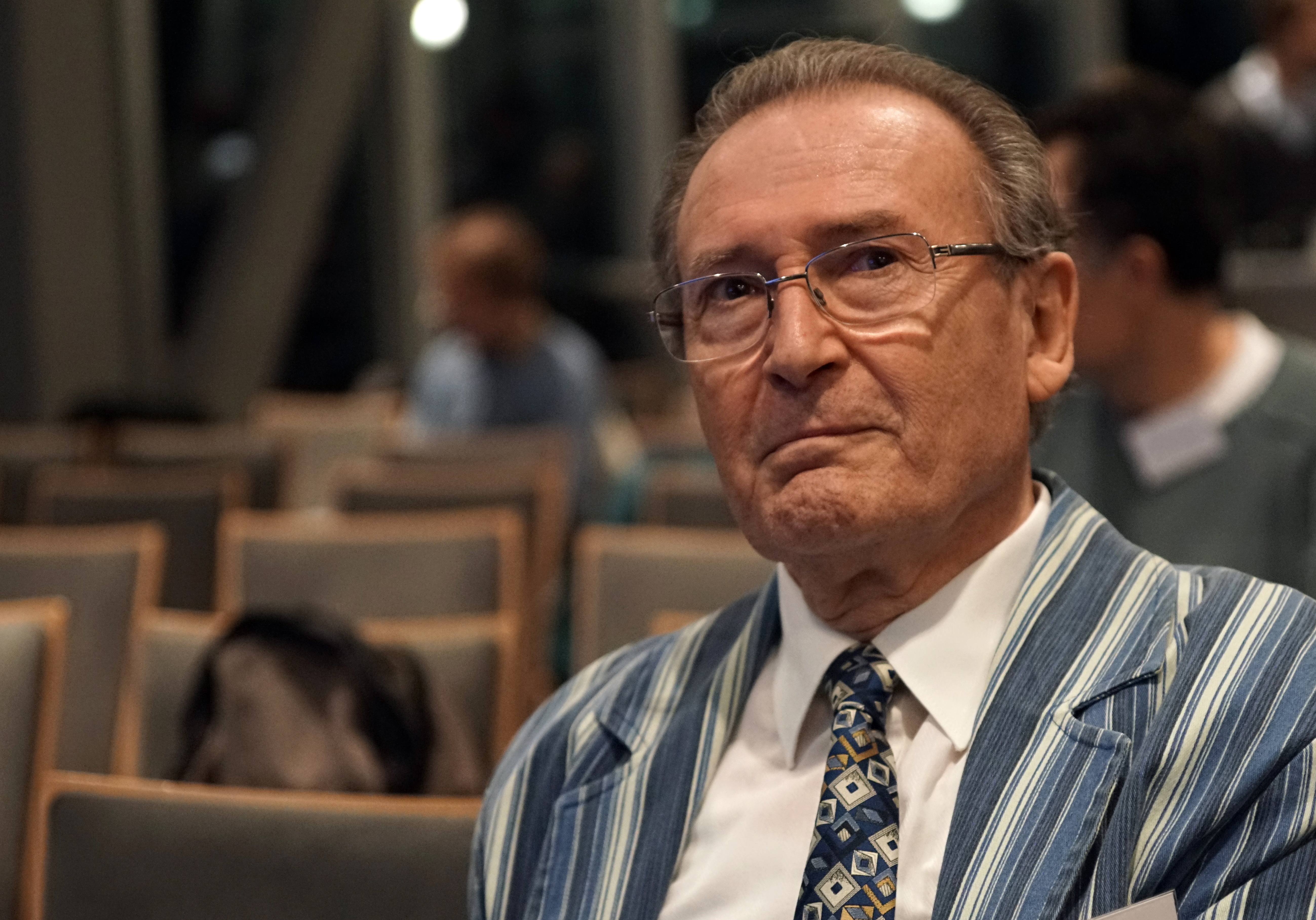 Gilt als einer der Begründer Evolutionstechnik: Prof. Dr. Hans-Paul Schwefel, aufgenommen am 18.11.2014 in Jena beim Interdisziplinären Symposium zu Evolutionstechniken "Ein halbes Jahrhundert Zickzack mit Darwin. Evolution - Evolutionäre Algorithmen - Artificial Life". Foto: Jan-Peter Kasper/FSU